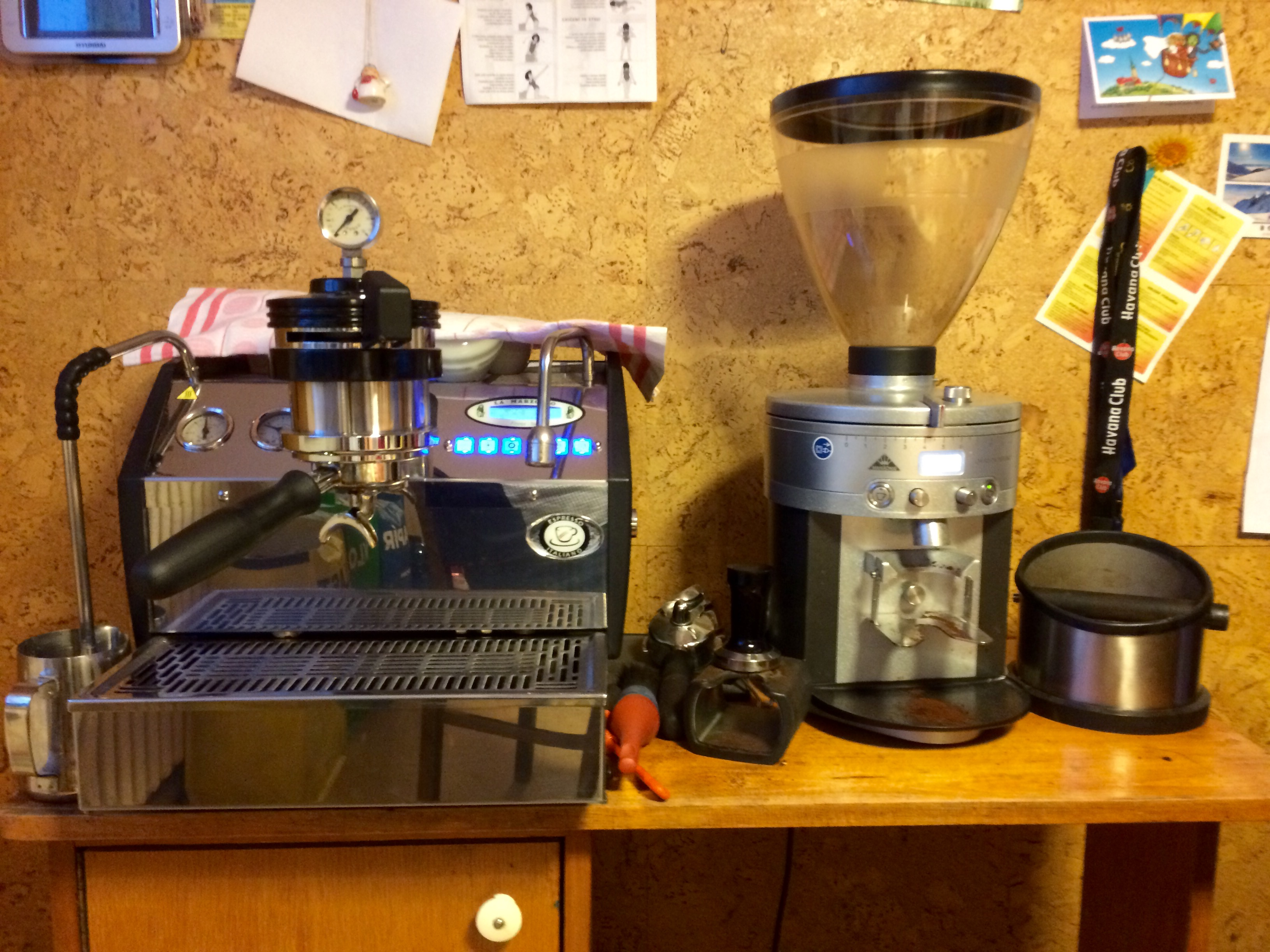 JJkavovar